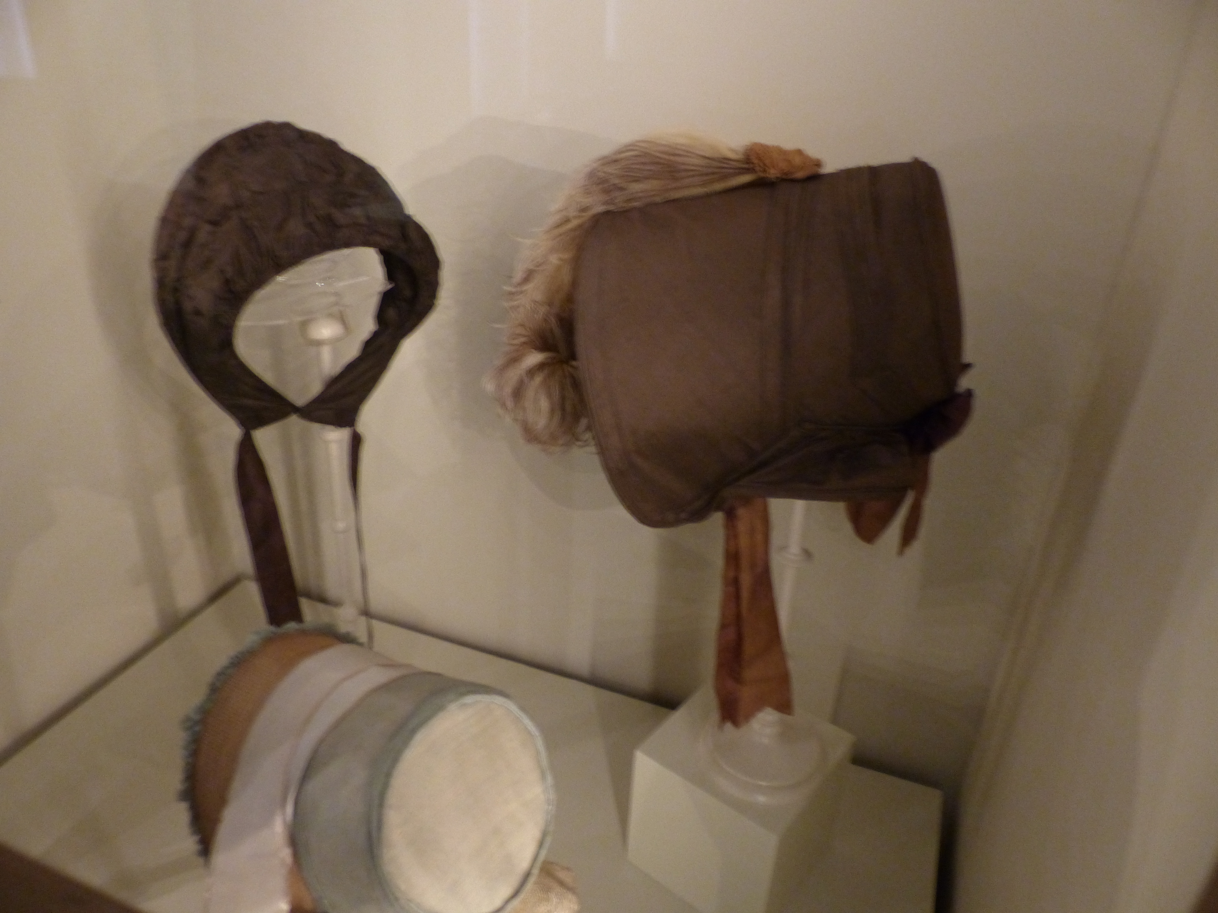 Capotas, Museo del Traje.